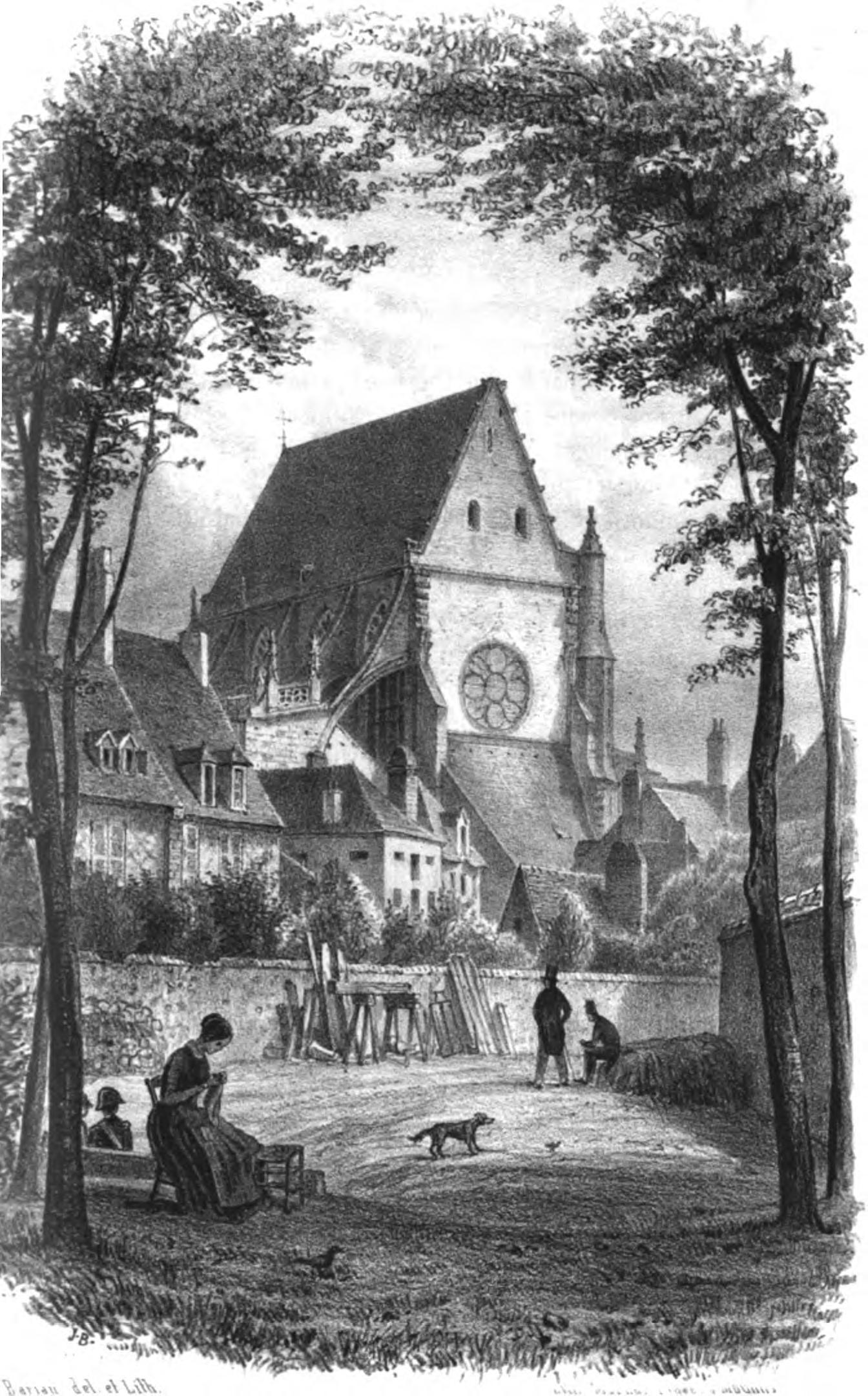 Collégiale Notre-Dame de Moulins (Allier-France) vers 1850. Gravure de Bariau. Extraite de L'Allier pittoresque, par François Gabriel T. Basset de Jolimont, Moulins, 1852